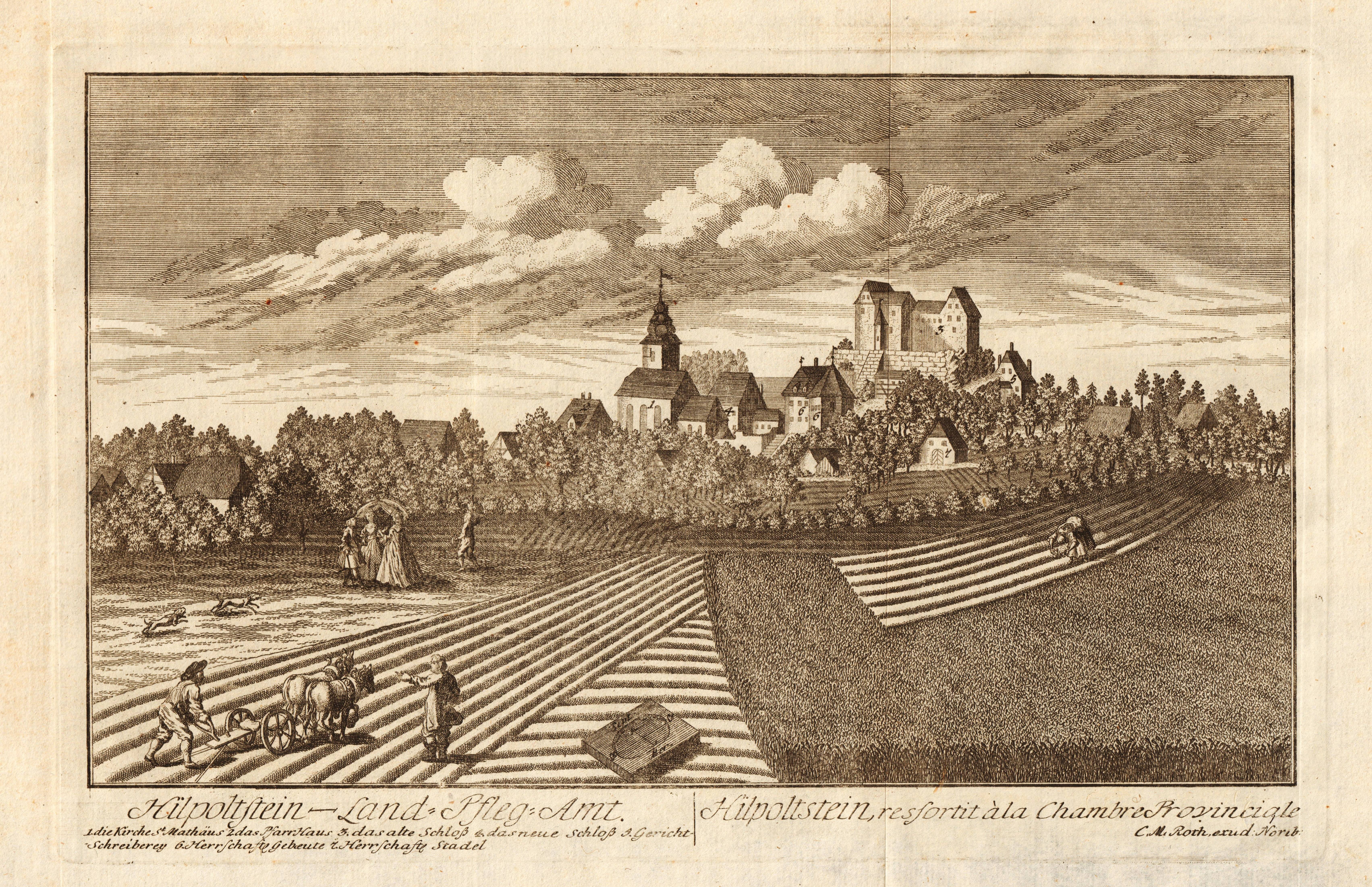 Kupferstich von Christoph Melchior Roth, 1760 Aus: "Prospecte aller Nürnbergischen Staedtlein, Markt-Flecken und Pfarr-Dörffer"